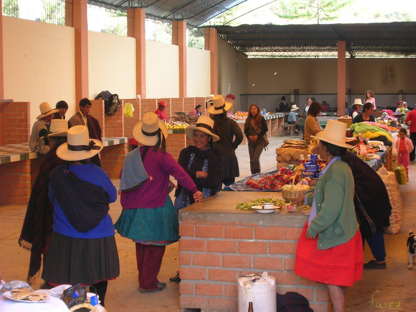 Template:Mercado de abastos - Oxamarca